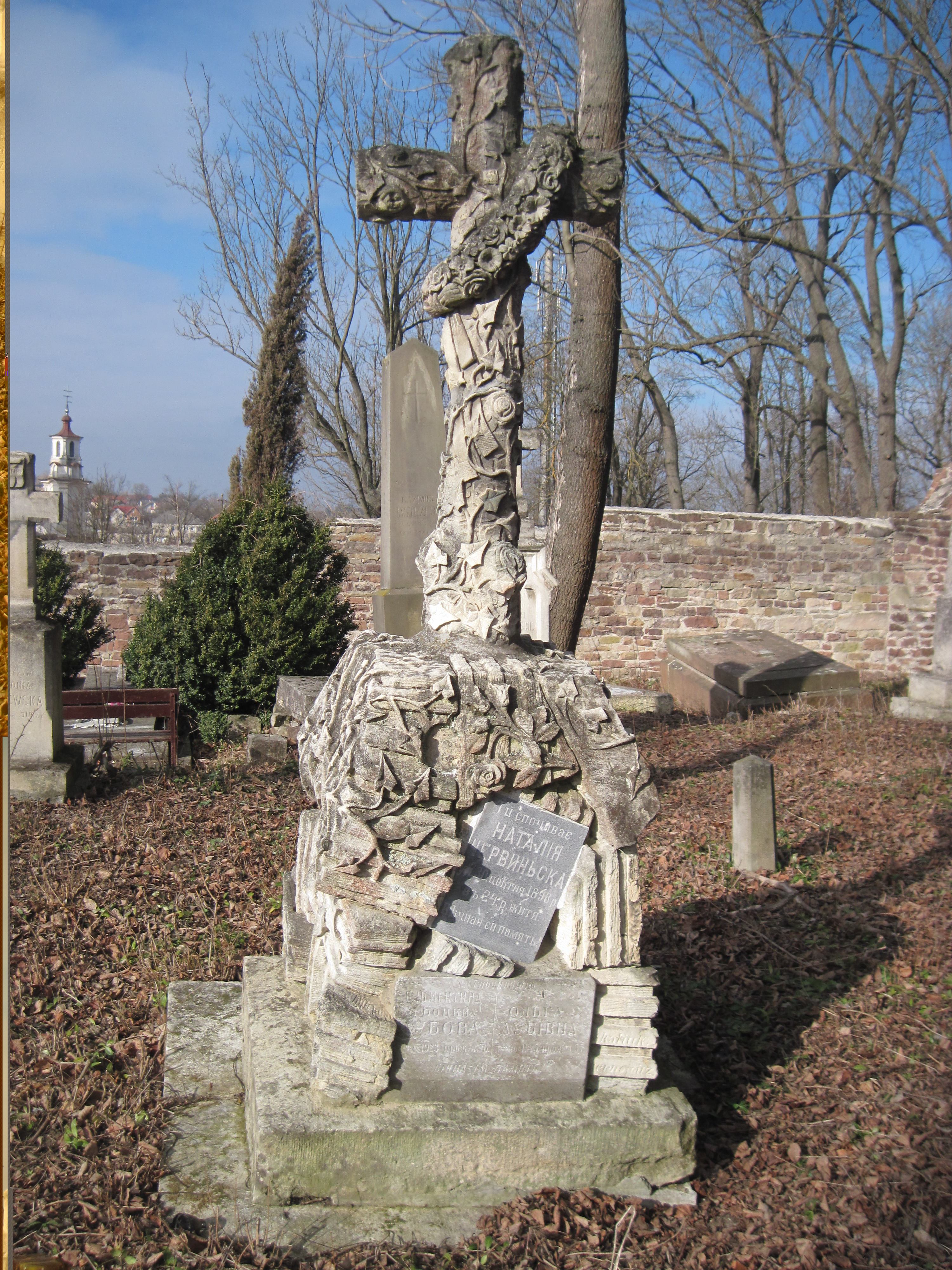 Надгробок Наталі Червінської на міському цвинтарі на пагорбі Федір, Бучач (на задньому плані — надгробки Василя Винара і Лєслава Хлєбека)